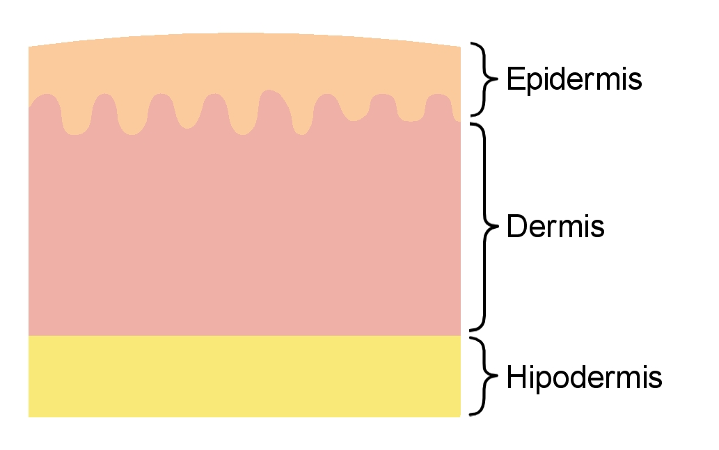 Representación esquemática de la piel.